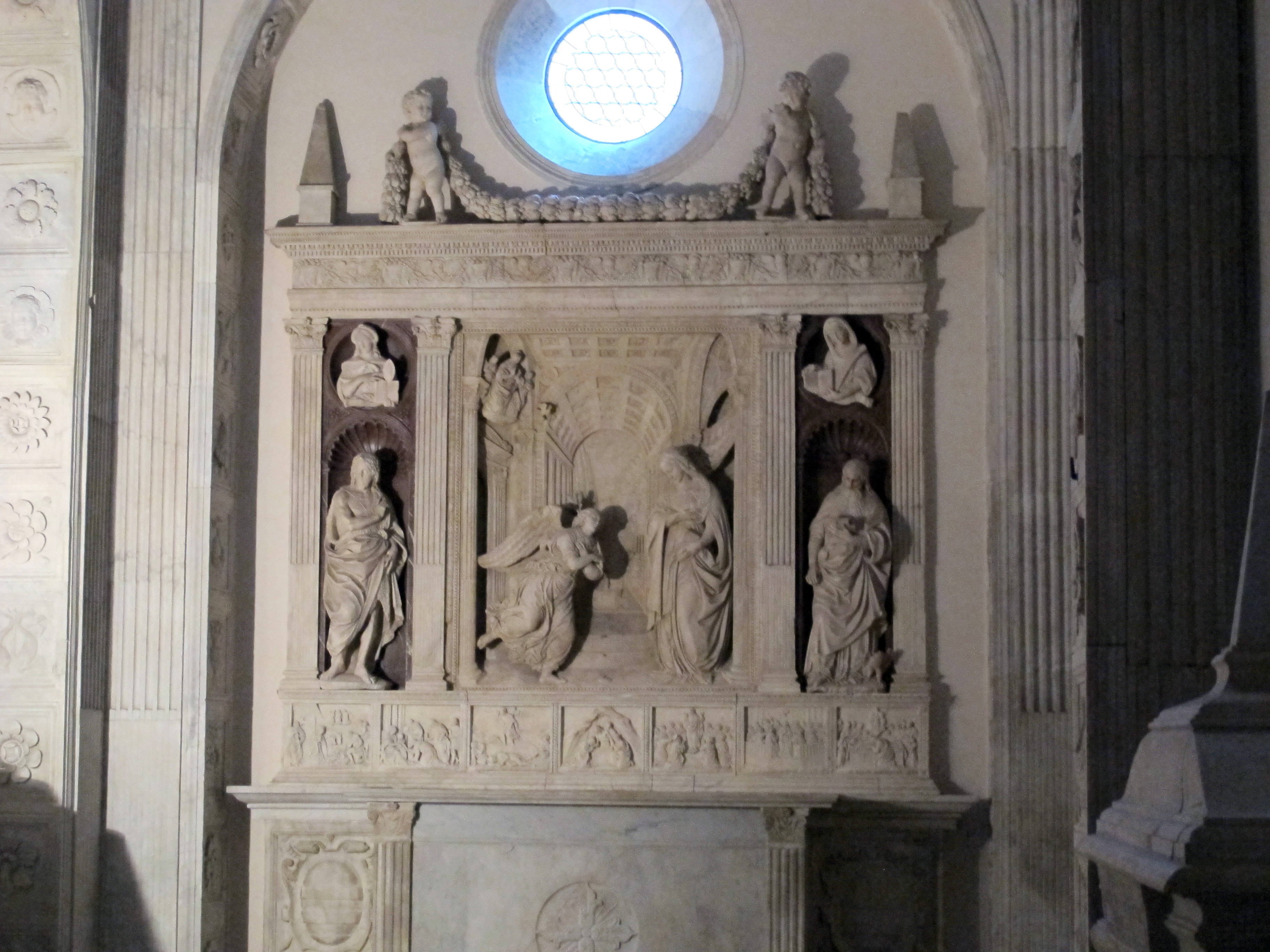 Sant'Anna dei Lombardi (Napoli)